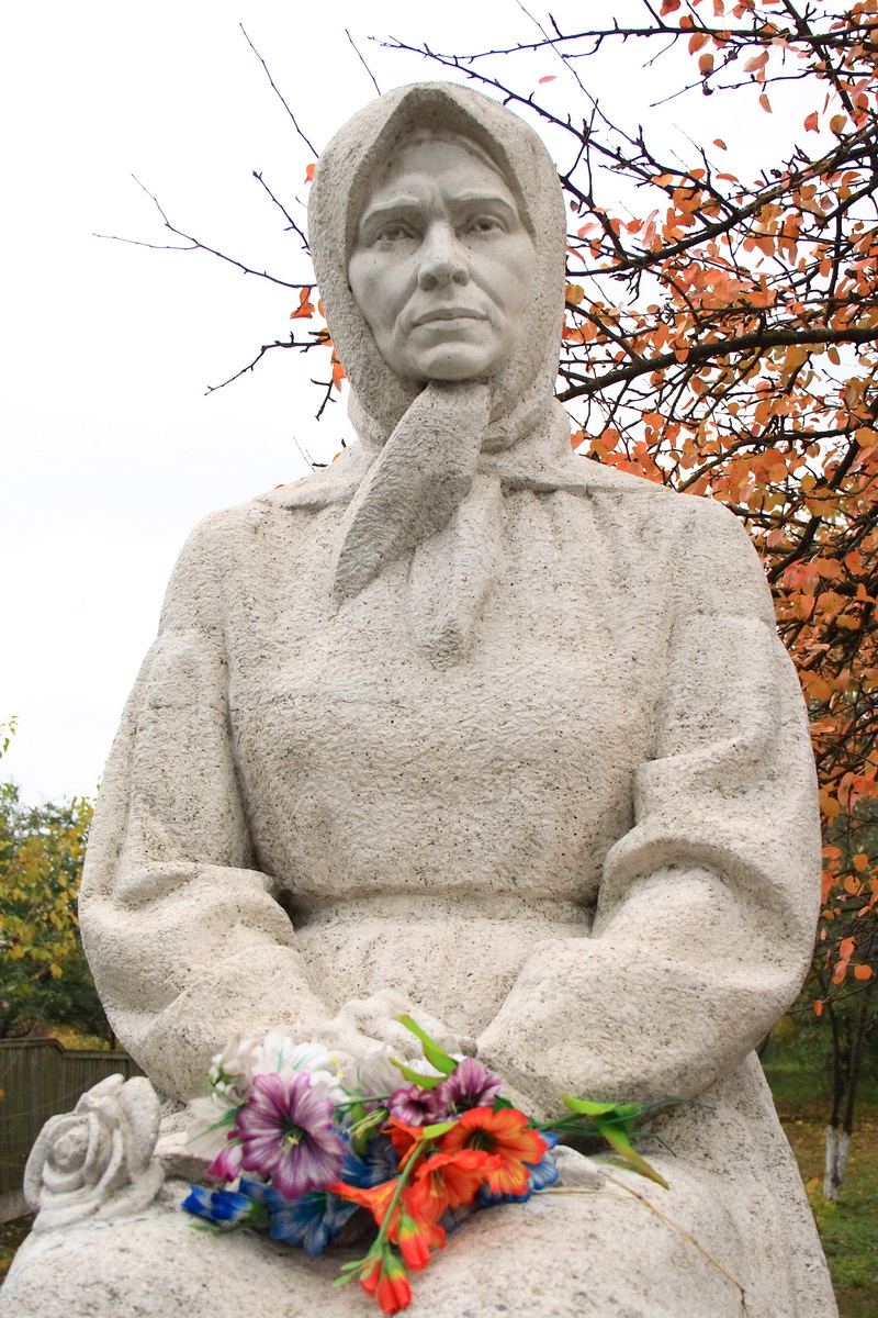 Пам'ятник Катерині Білокур у музеї-садибі в селі Богданівка Яготинського району Київської області